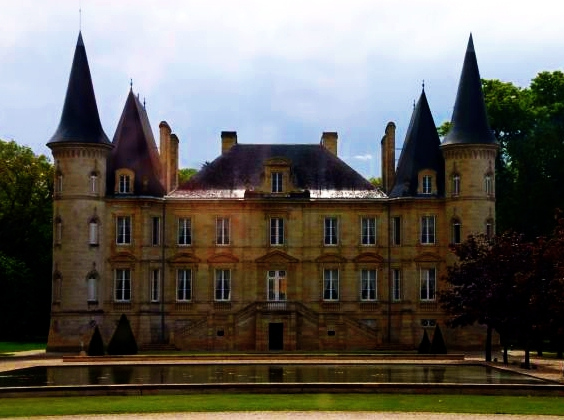 Chateau Pichon Baron, Pauillac, Bordeaux, France